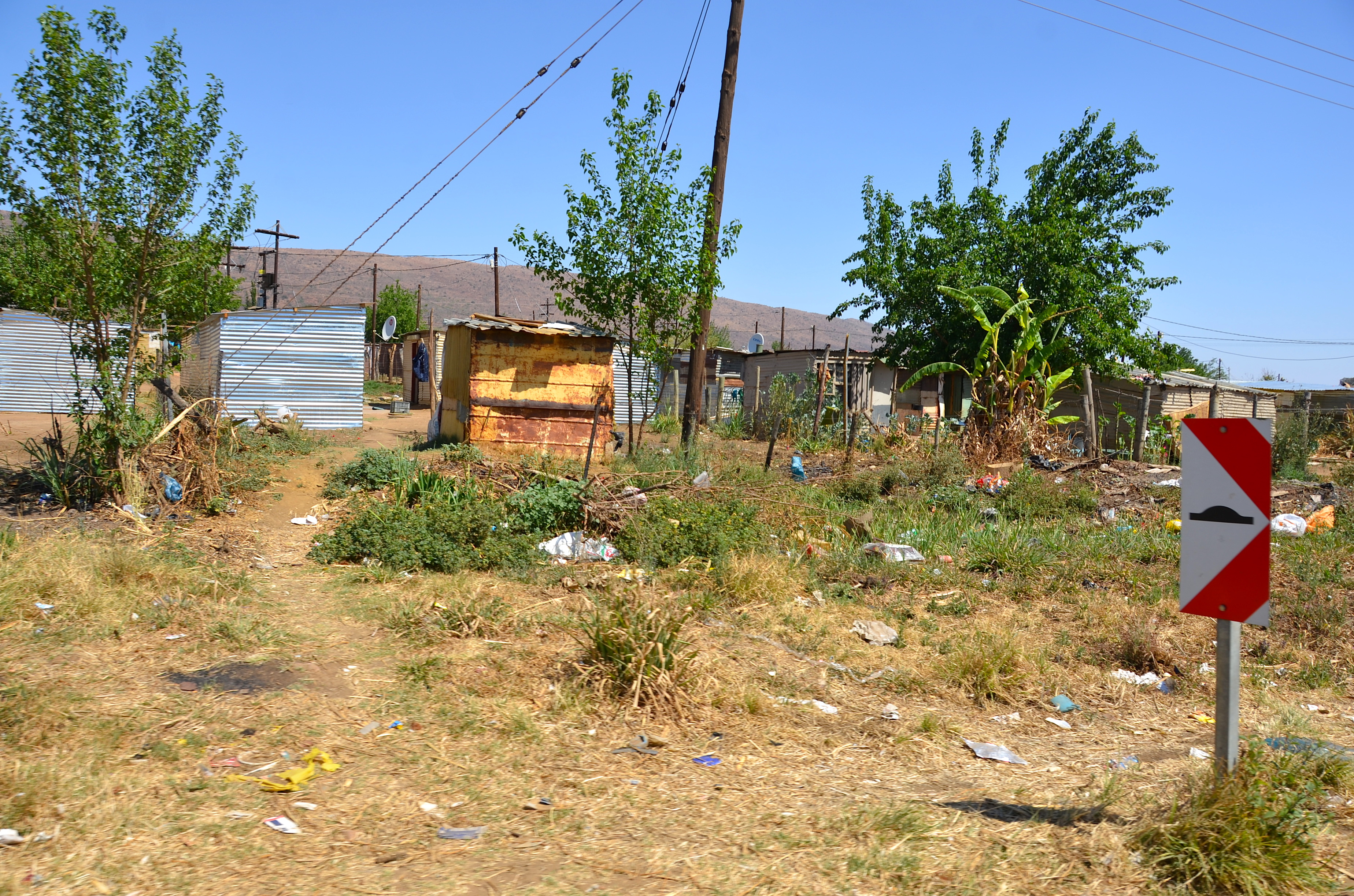 Behausungen und Müll von illegalen Einwanderern in Südafrika (R560)